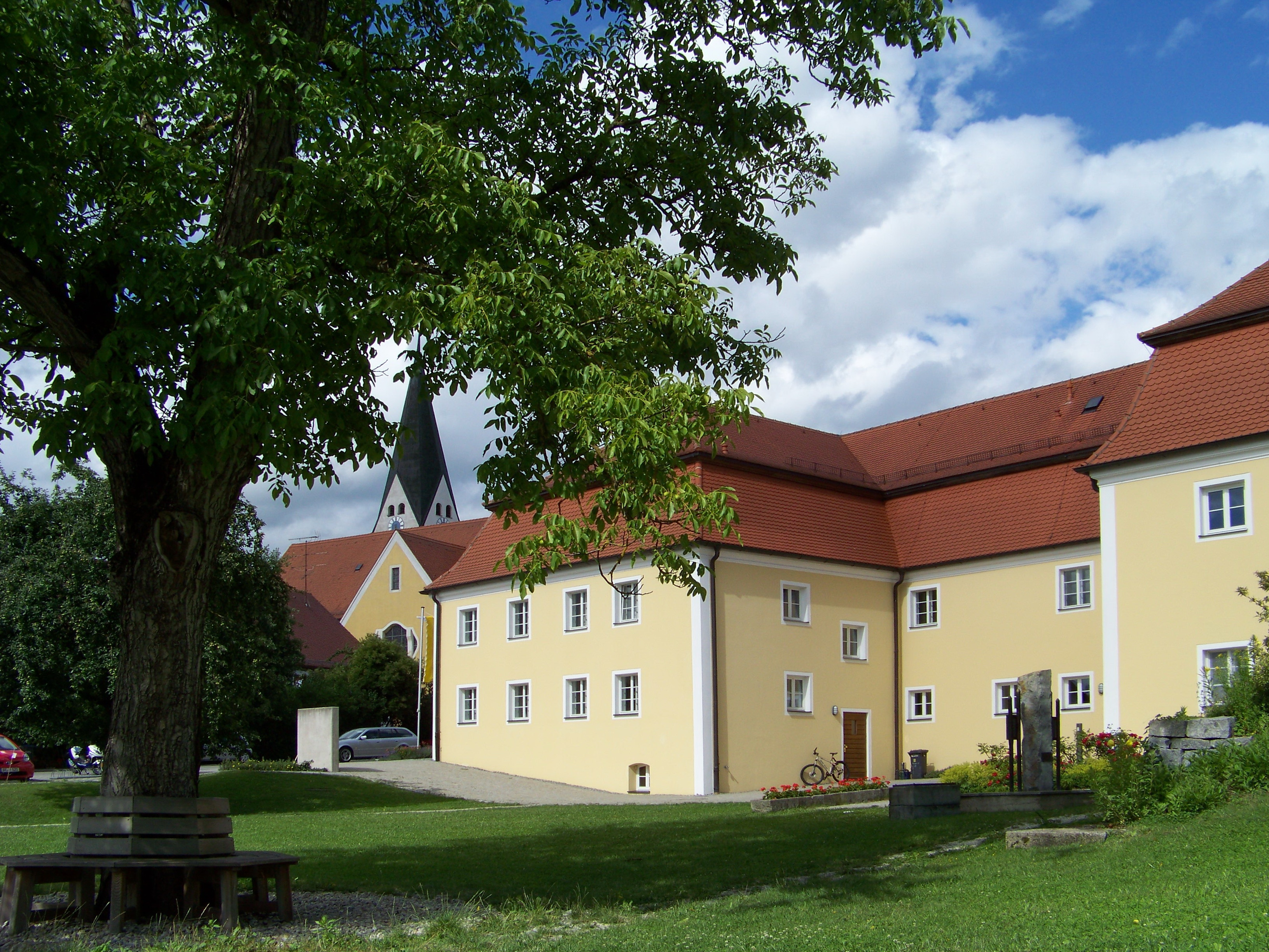 Laberweinting. Ensemble Pfarrkirche St. Martin, ehemaliger Pfarrhof. Beides sind denkmalgeschützte Bauten.